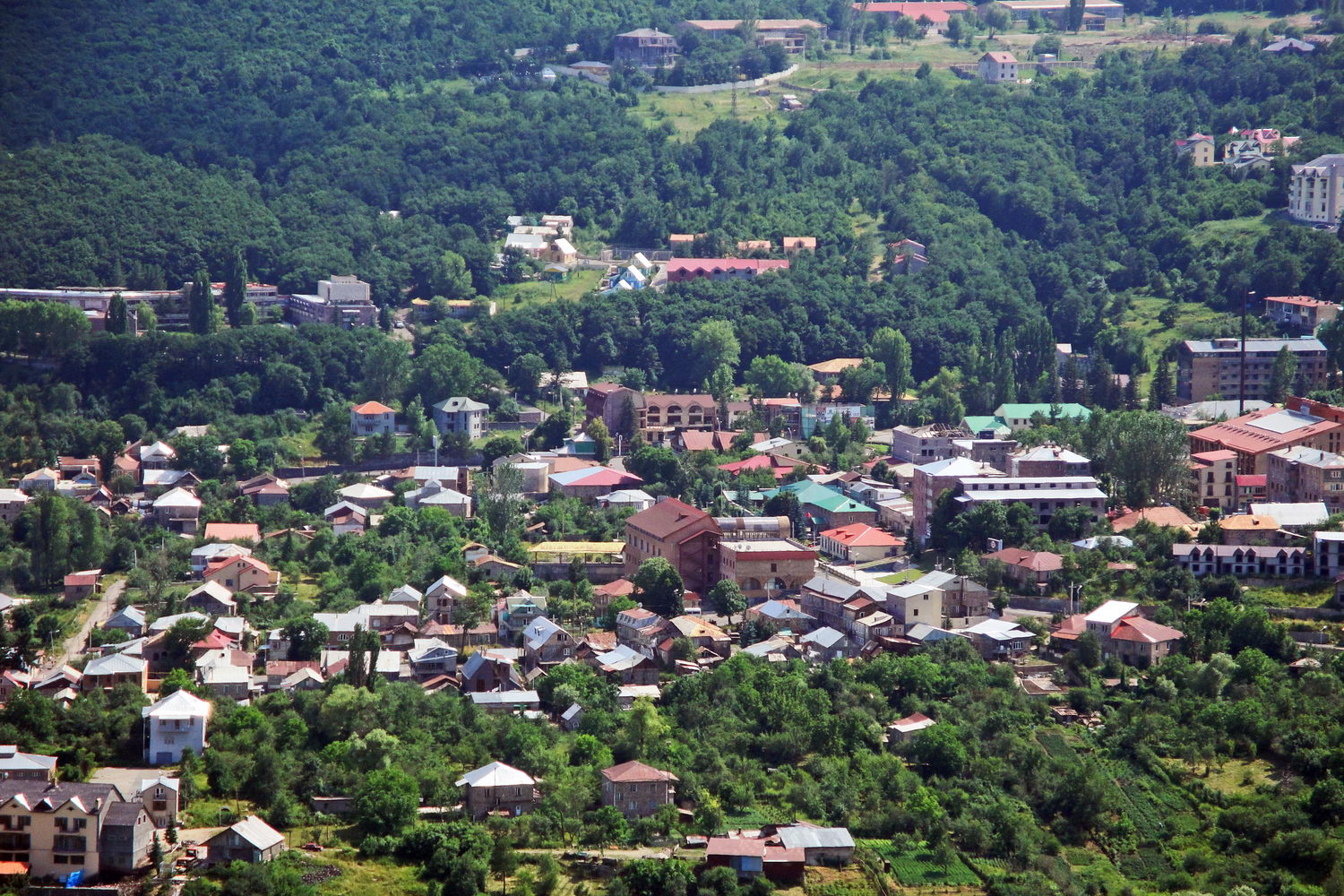 Tsaghkadzor, general view